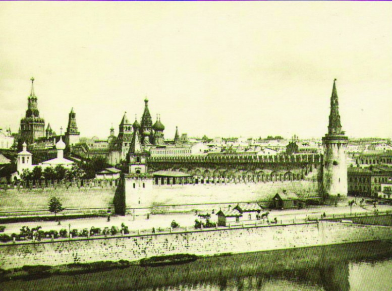 Кремль с Москворецкого моста. вероятно, ошибка в подписи. Москворецкий мост (тем более старый, стоявший в створе Балчуга) существенно правее, это снято с Софийской